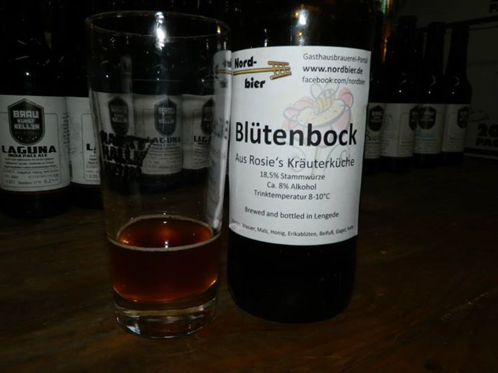 Foto mit Bierflasche und Glas